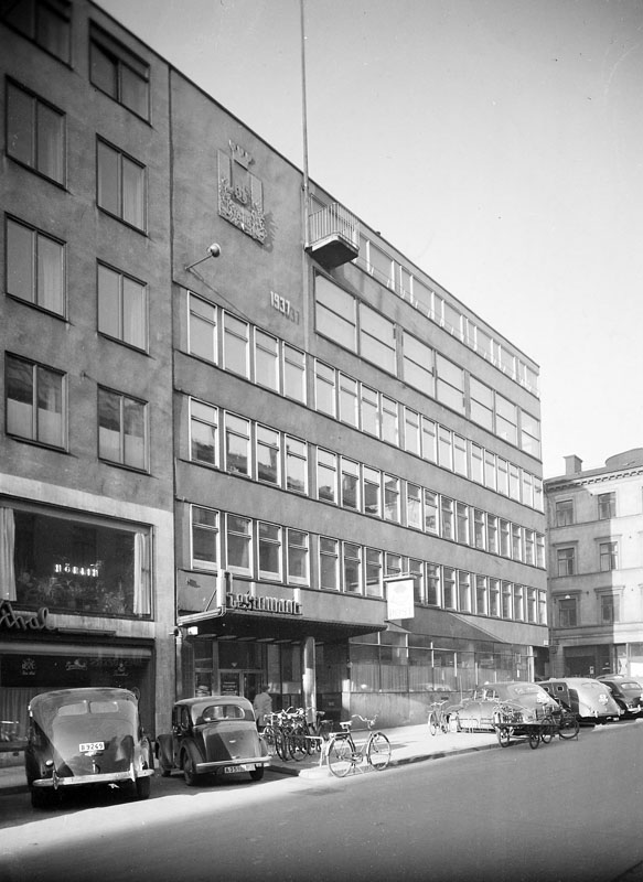 Byggnadsföreningens restaurang, Norrlandsgatan 11. Huset byggdes 1937 och ingår nu i kv. Hästen